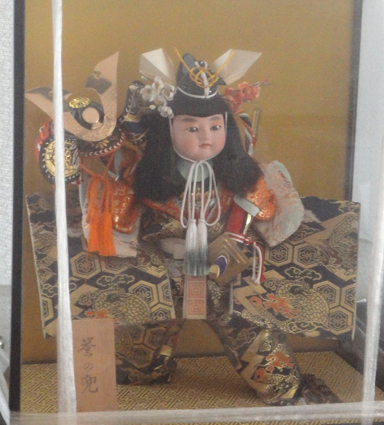 五月人形(誉の兜)